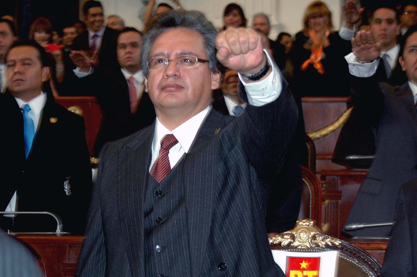 Toma de protesta como Diputado Local por Tlalpan